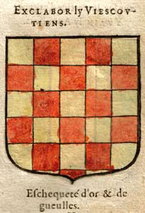 Exclabor